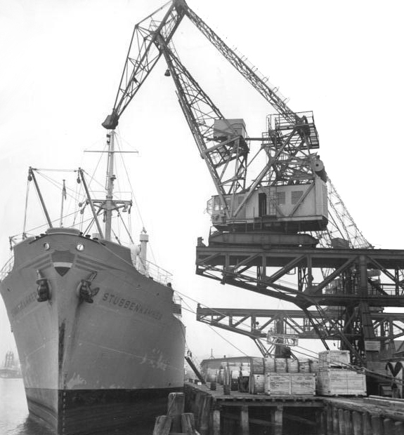 Factual corrections and alternative descriptions are encouraged separately from the original description. Additionally errors can be reported at this page to inform the Bundesarchiv. Original historic description: Rostock, Überseehafen, Stückgut wird gelöscht Zentralbild Mellahn 11.2.1959 DDR-Handelsflotte wird auf 110 Schiffe anwachsen Die Handelsflotte der Deutschen Demokratischen Republik wird bis Ende 1965 über 110 Schiffe verfügen. Gegenwärtig befahren 32 Schiffe unter der schwarz-rot-goldenen Flagge der DDR die Nord- und Ostsee, das Mittelmeer und den Indischen Ozean. Allein im vergangenen Jahr stellte die Deutsche Seereederei fünf 10000-Tonnen-Frachter und zwei 4000-Schiffe in Dienst. UBz: Zu den im Vorjahr in Dienst gestellten Schiffen gehört der 4000-Tonnen-Frachter "Stubbenkammer". Die Ladung wird nach erfolgreicher Fahrt der "Stubbenkammer" in die Häfen der VAR im Rostocker Hafen gelöscht.